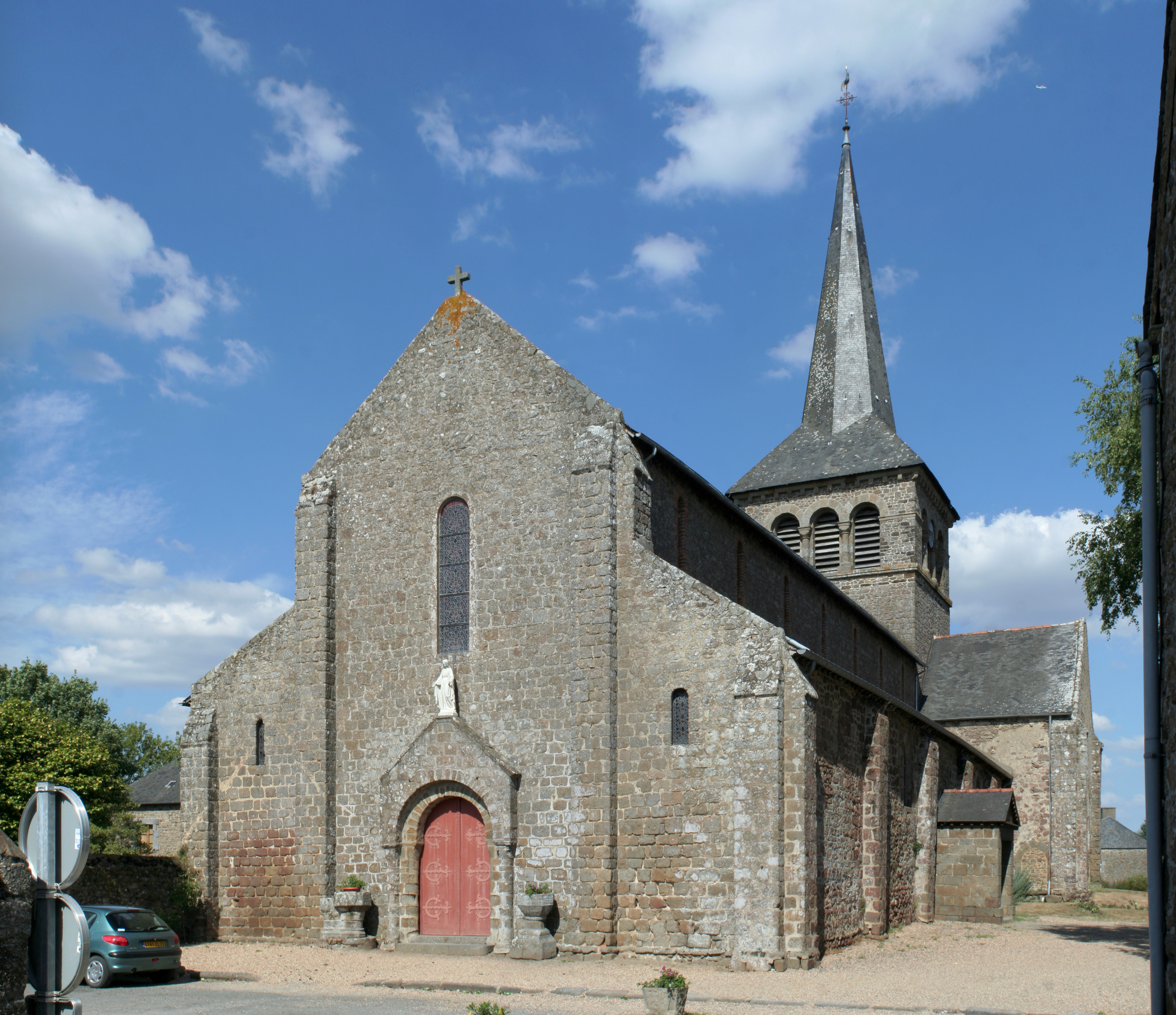 Hédé, Ille-et-Vilaine, Bretagne, France Façade occidentale de l'église Notre-Dame.